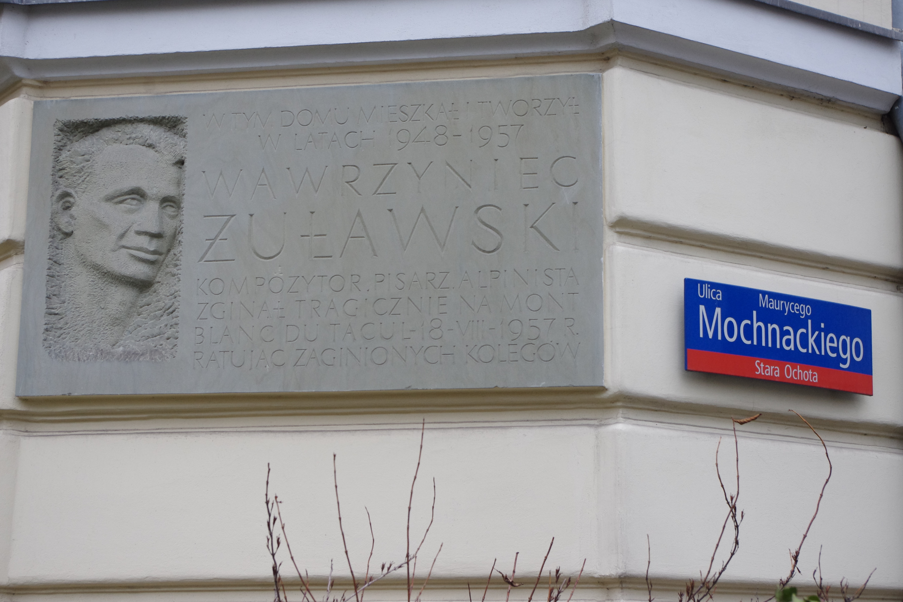 Tablica upamiętniająca taternika, pisarza i kompozytora Wawrzyńca Żuławskiego na Starej Ochocie w Warszawie